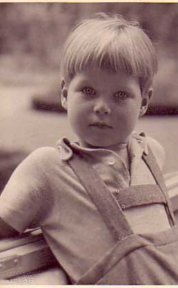 Príncipe Alexandre Jorge de Hesse (1933–1937)